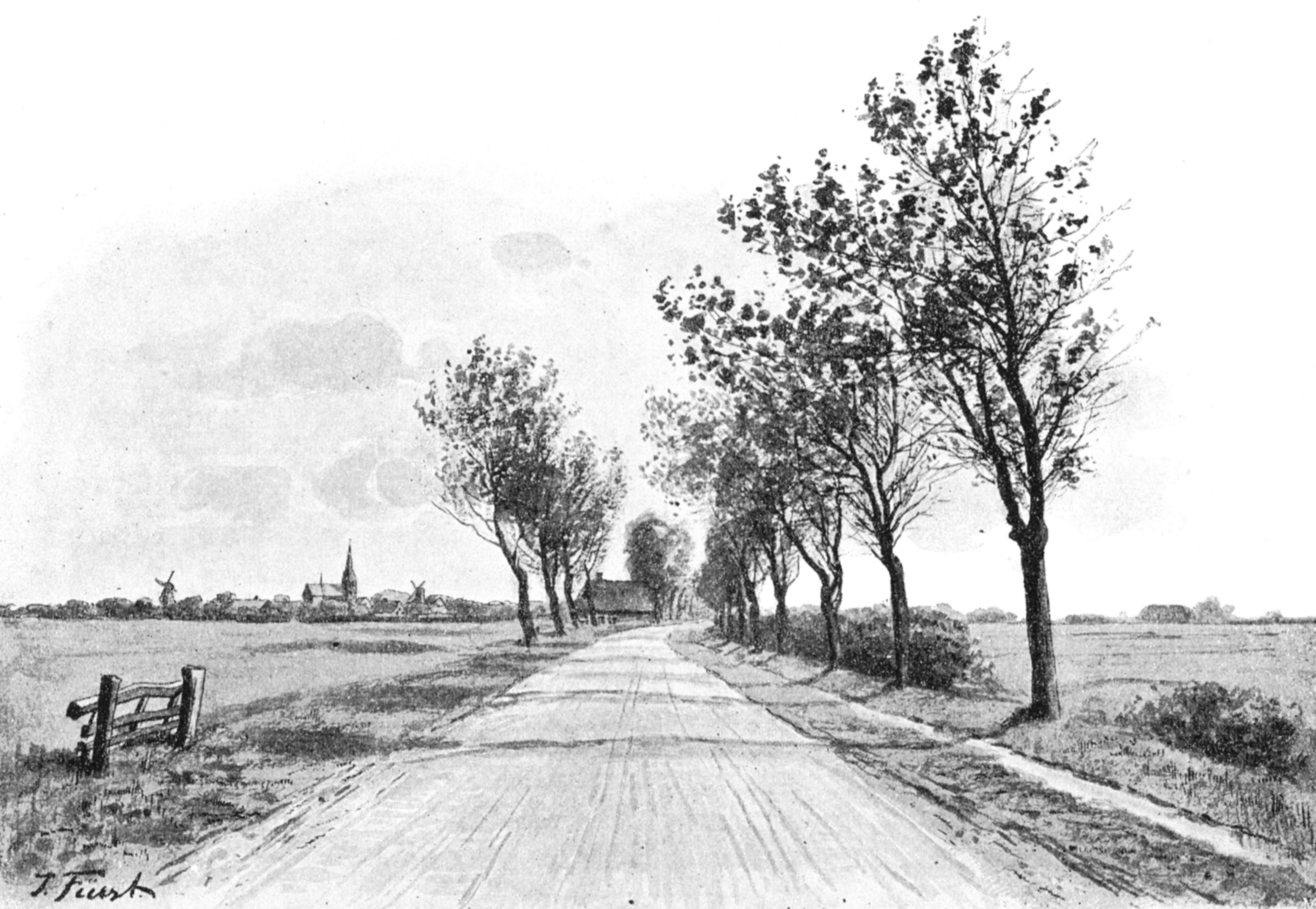 Landstraße nach Meldorf, Zeichnung von Julius Fürst